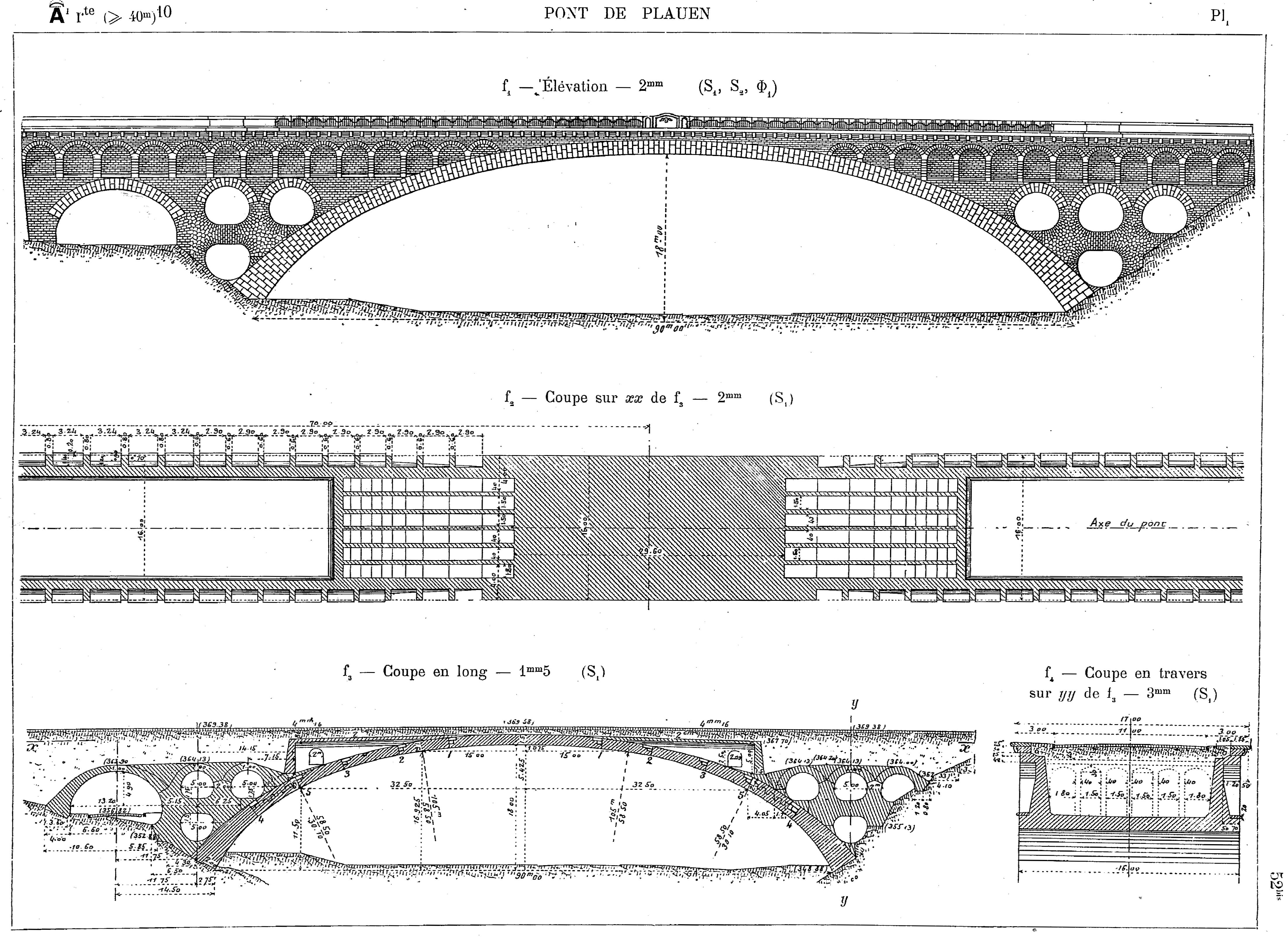 Viaduc du Syratal – Plauen – Allemagne – coupe en élévation.